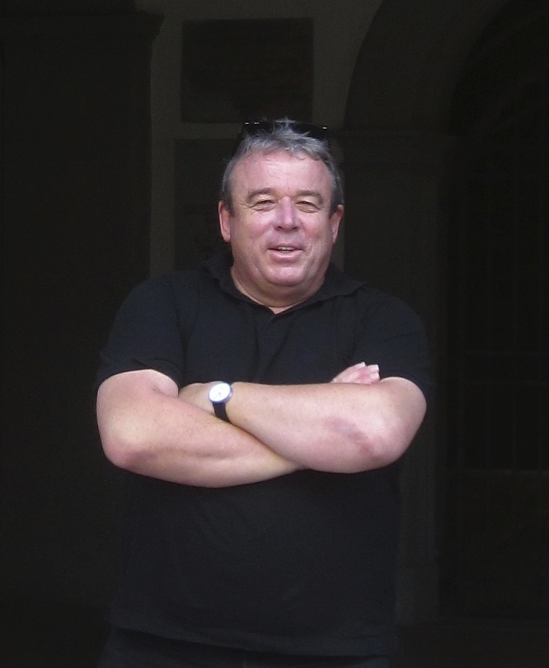 Portrait Wilfried Hajek in der italienischen Stadt Cetona